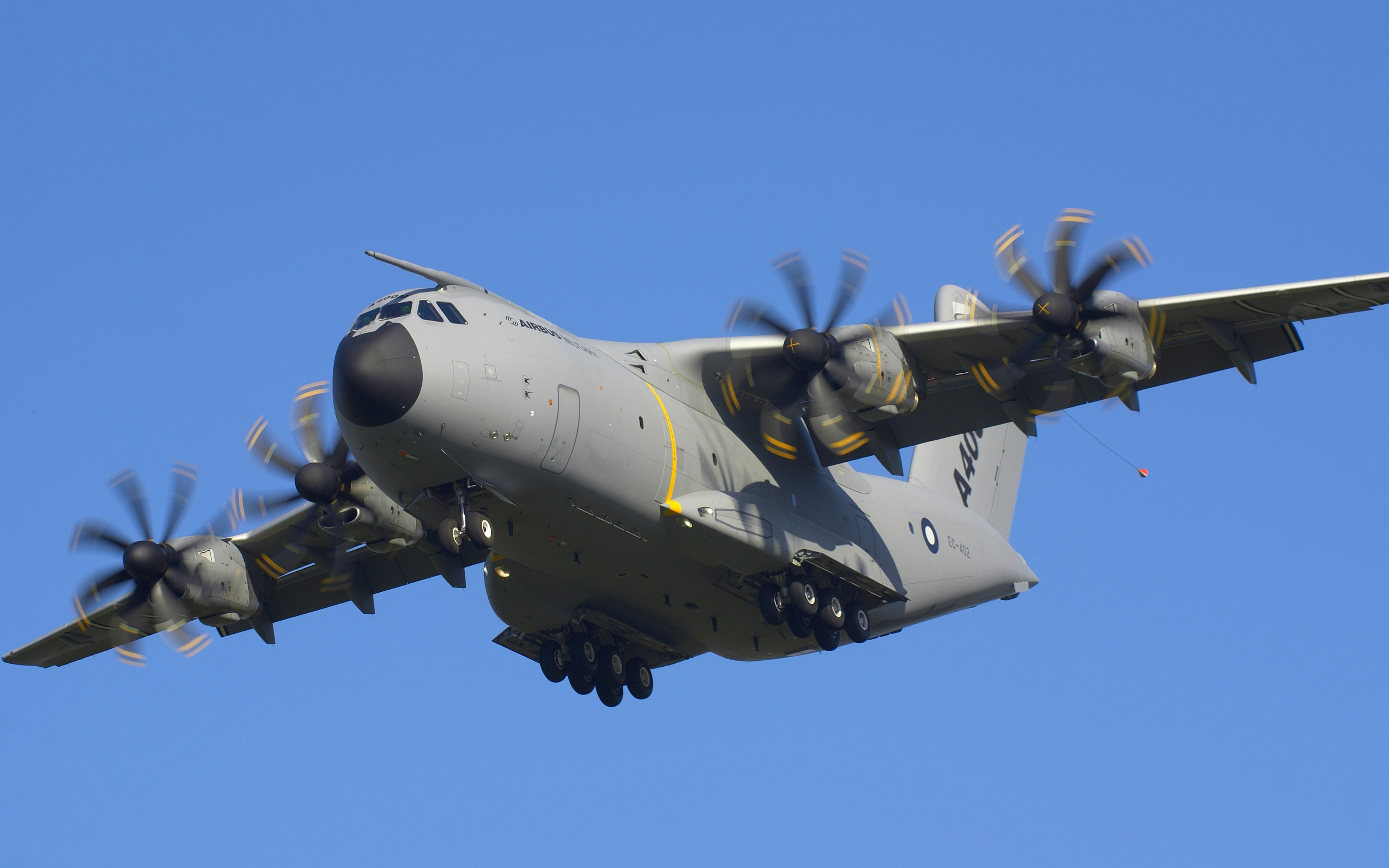 Vol de qualification A400M - TLS - Finale sur 32L. Cet appareil immatriculé en Espagne EC-402 avec le numéro de série MSN2 est le 2e appareil en vol. Basé à Séville, son premier vol date de 2010.